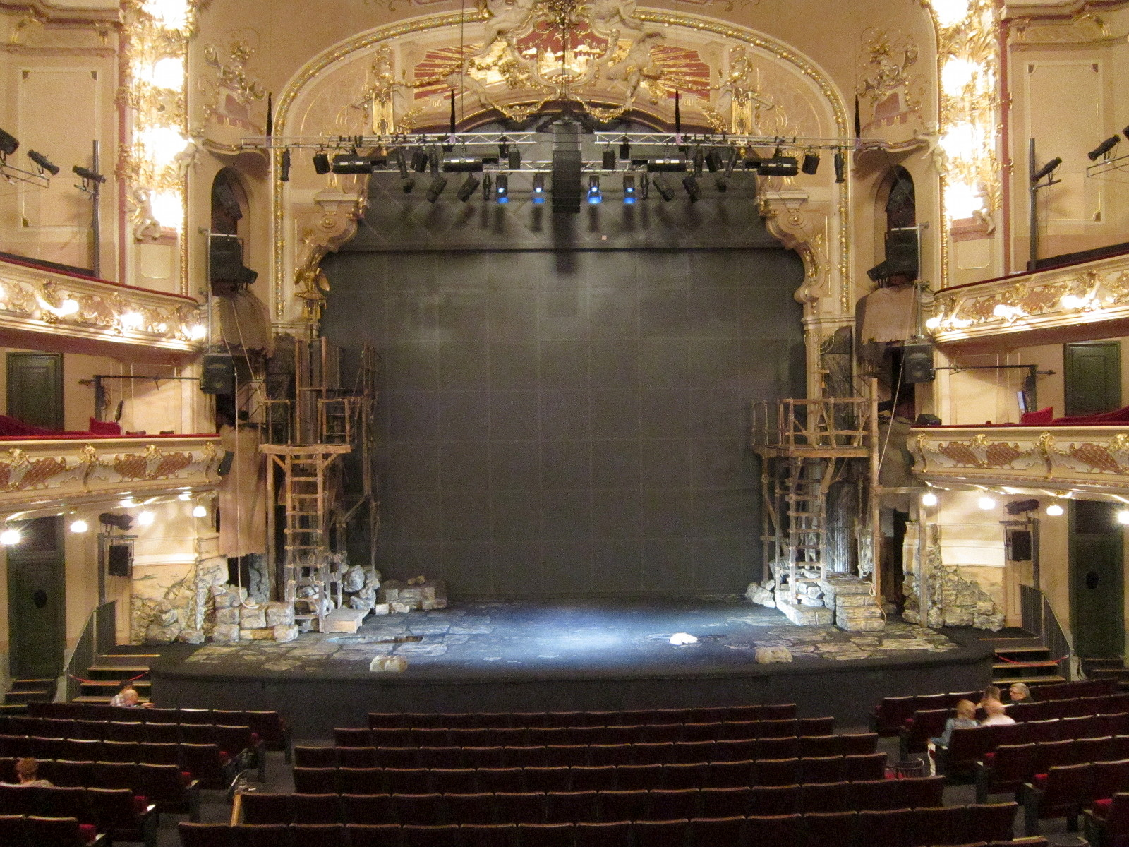 sál Hudebního divadla Karlín s částí scény k představení Jesus Christ Superstar